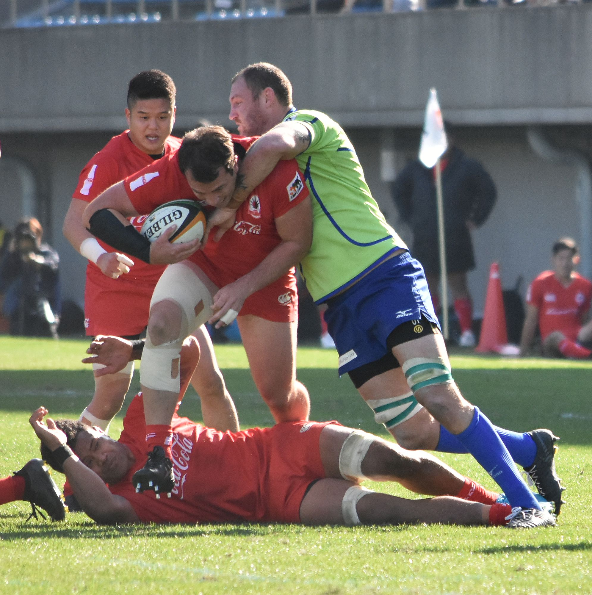 ソロモン・キング